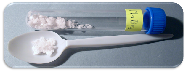 Bromid manganatý - MnBr2